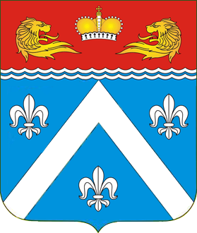 Герб Кореиза, Крым.